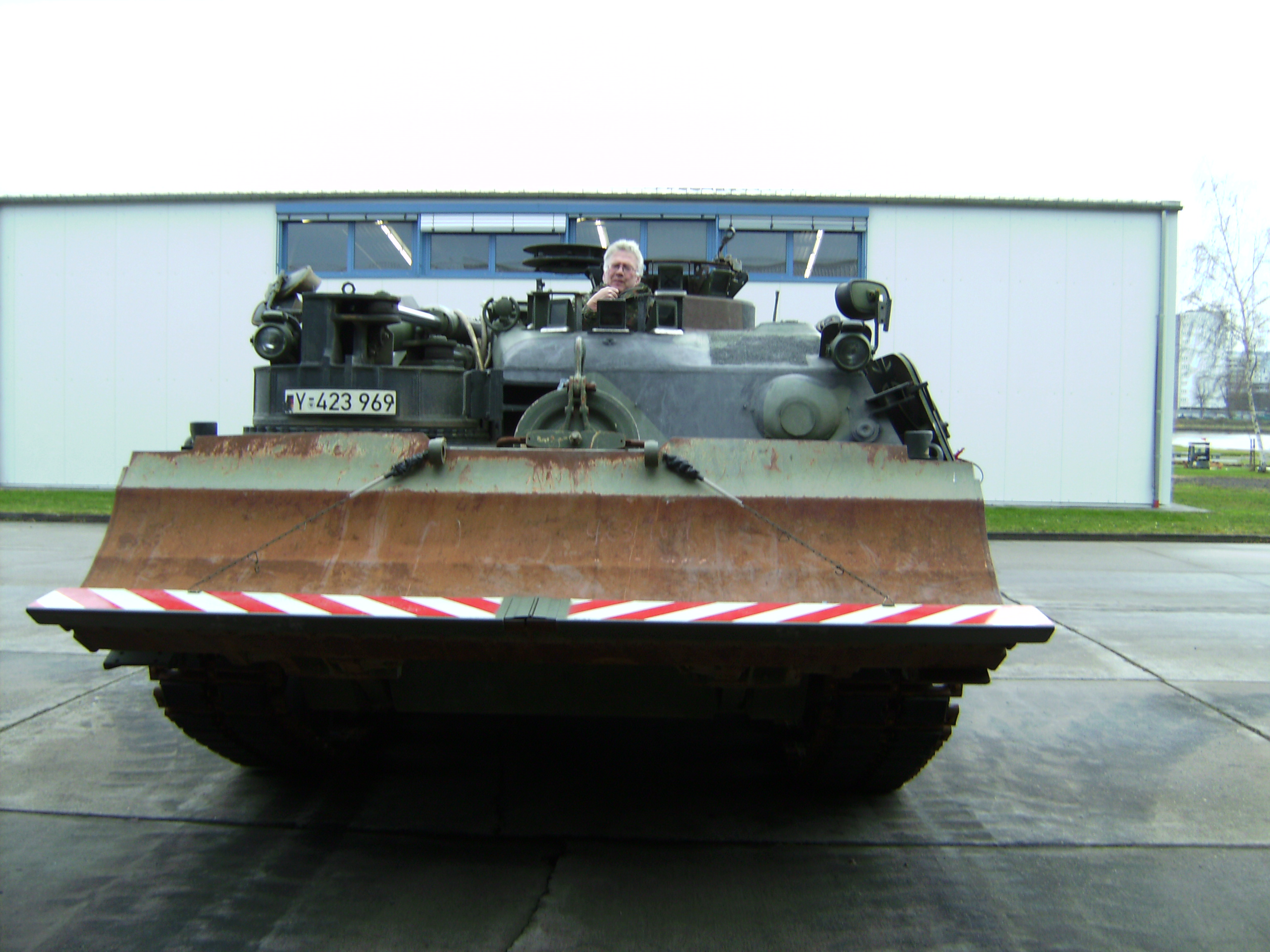 PiPz Dachs 2